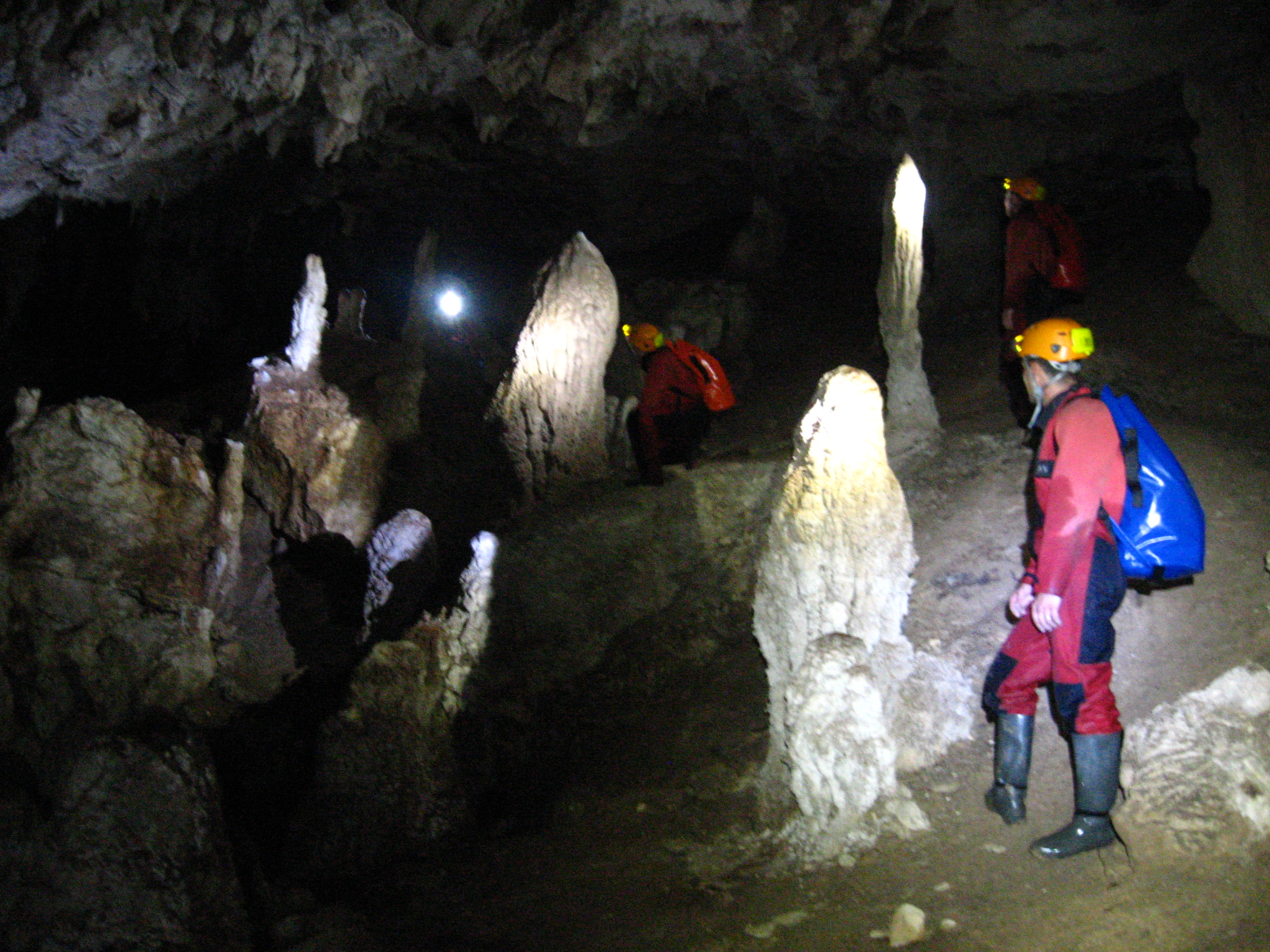 Cseppkövek a Csodateremben, szolcsvai Búvópatak barlangja, Erdély